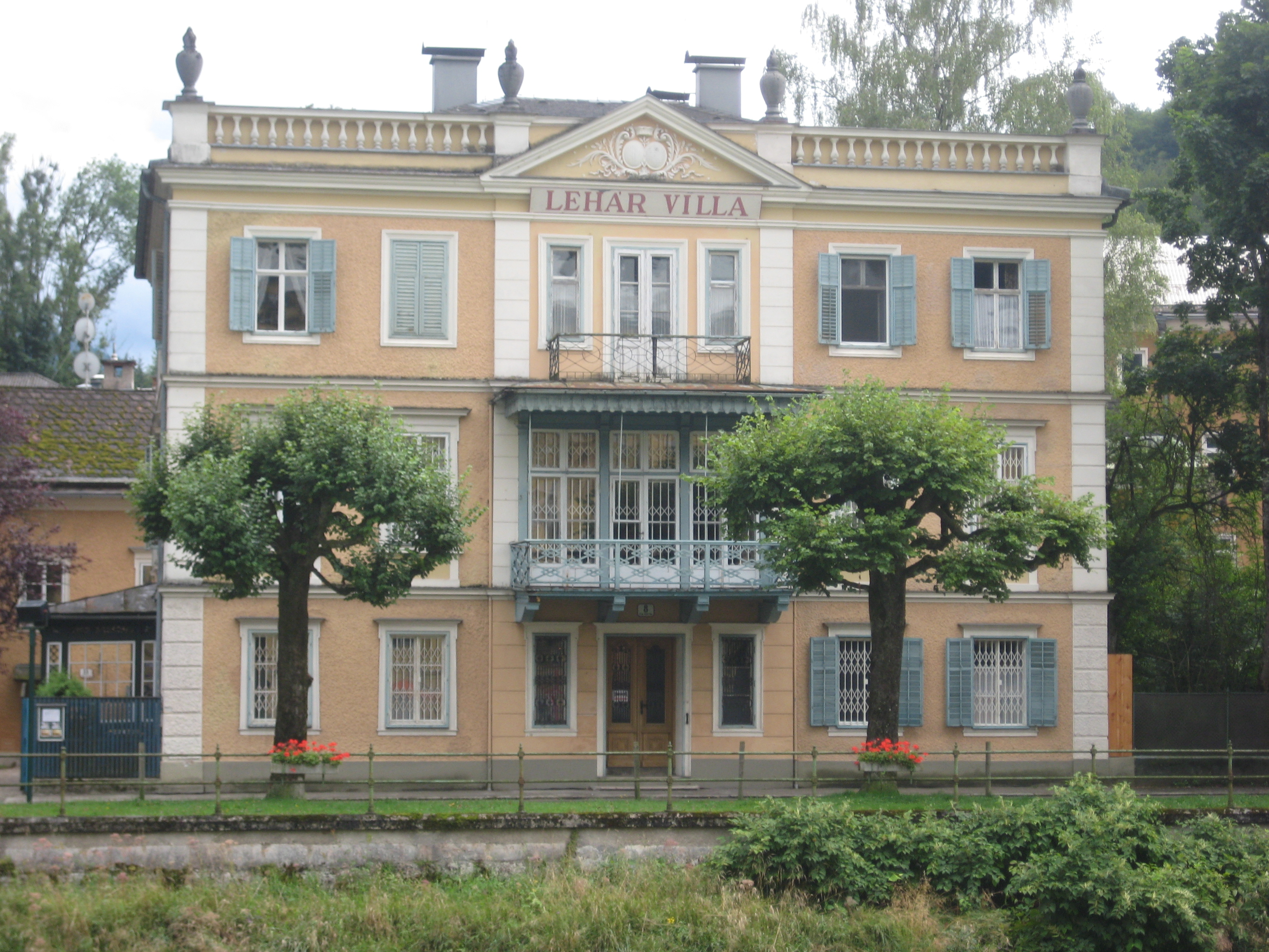 Franz-Lehár-Museum